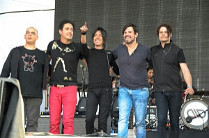 DLD Banda de Rock Mexicana